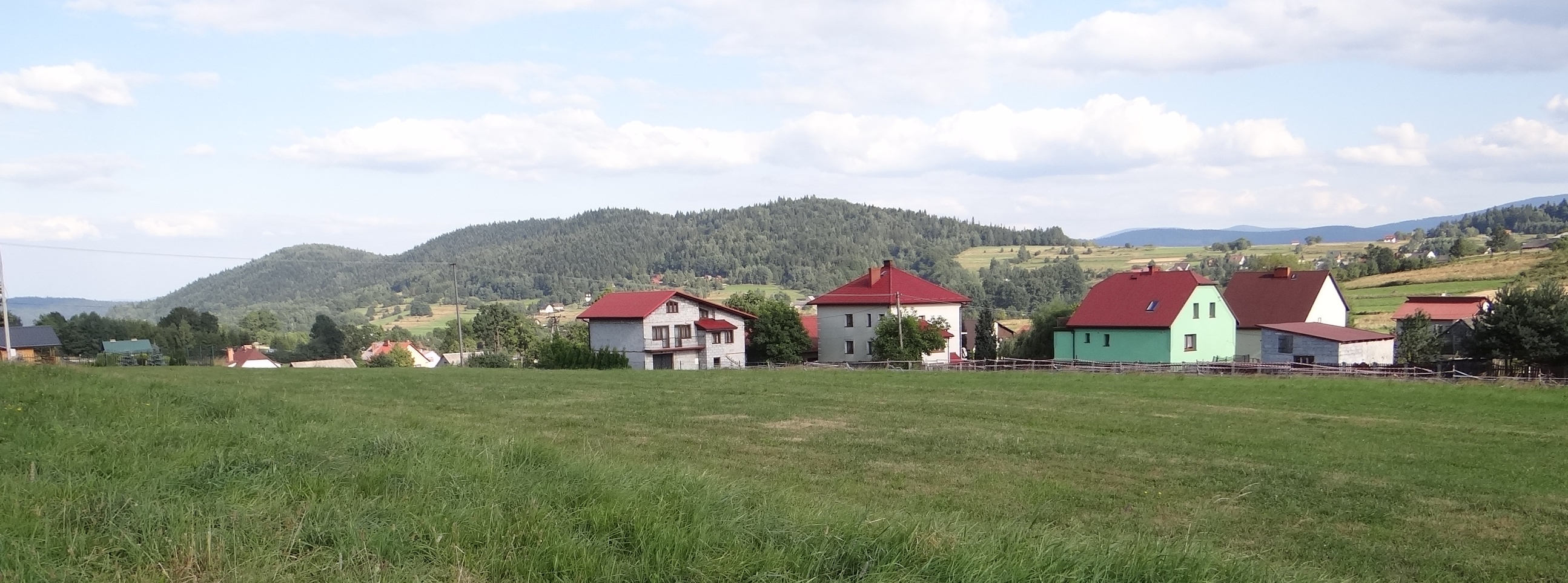 Miejscowość Kocoń i widok na Matysiaków Groń (z niebieskiego szlaku w Beskid Mały)